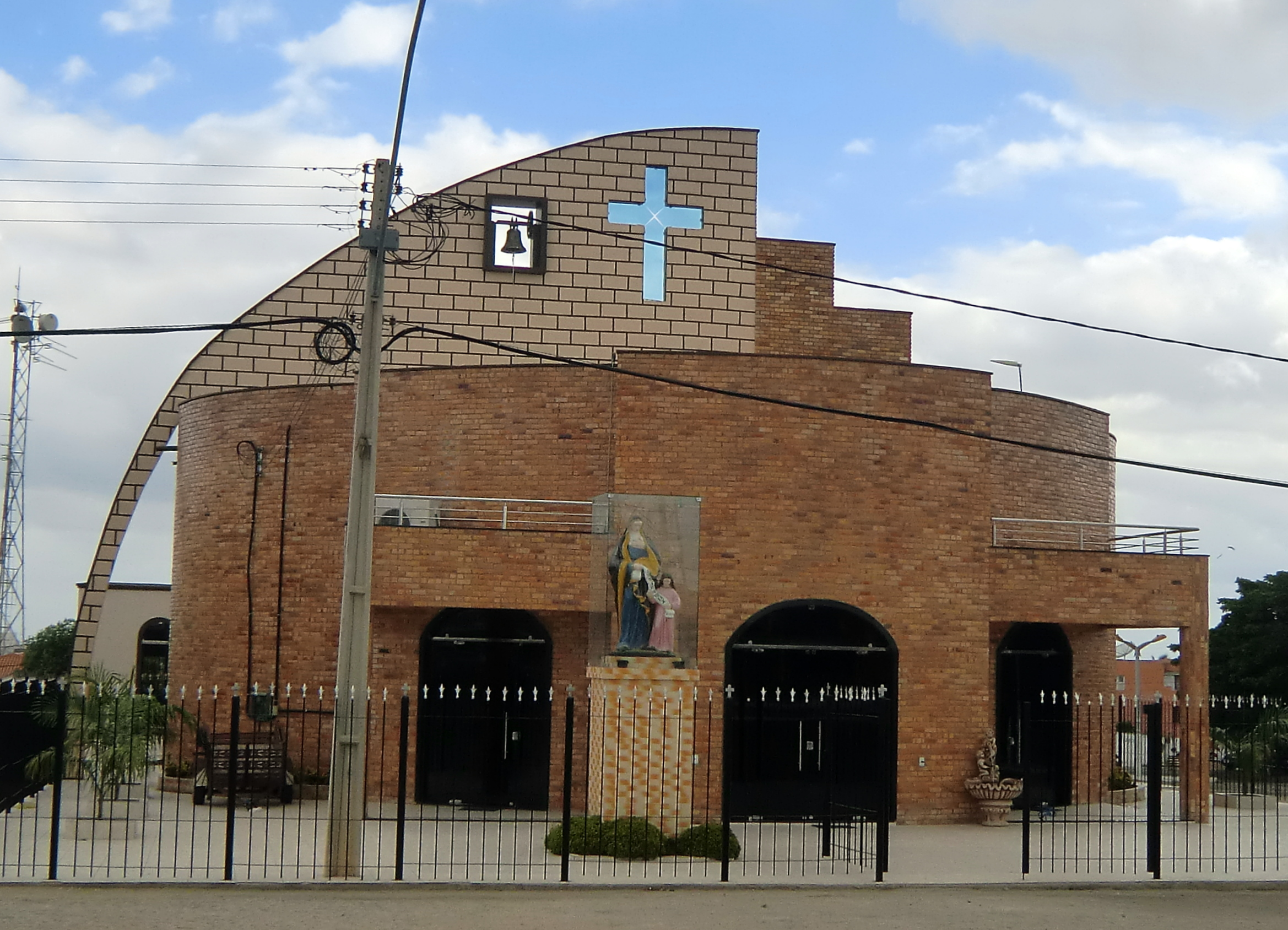 Igreja-Matriz de Varjota-CE